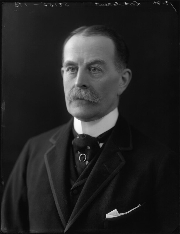 Lord Crewe